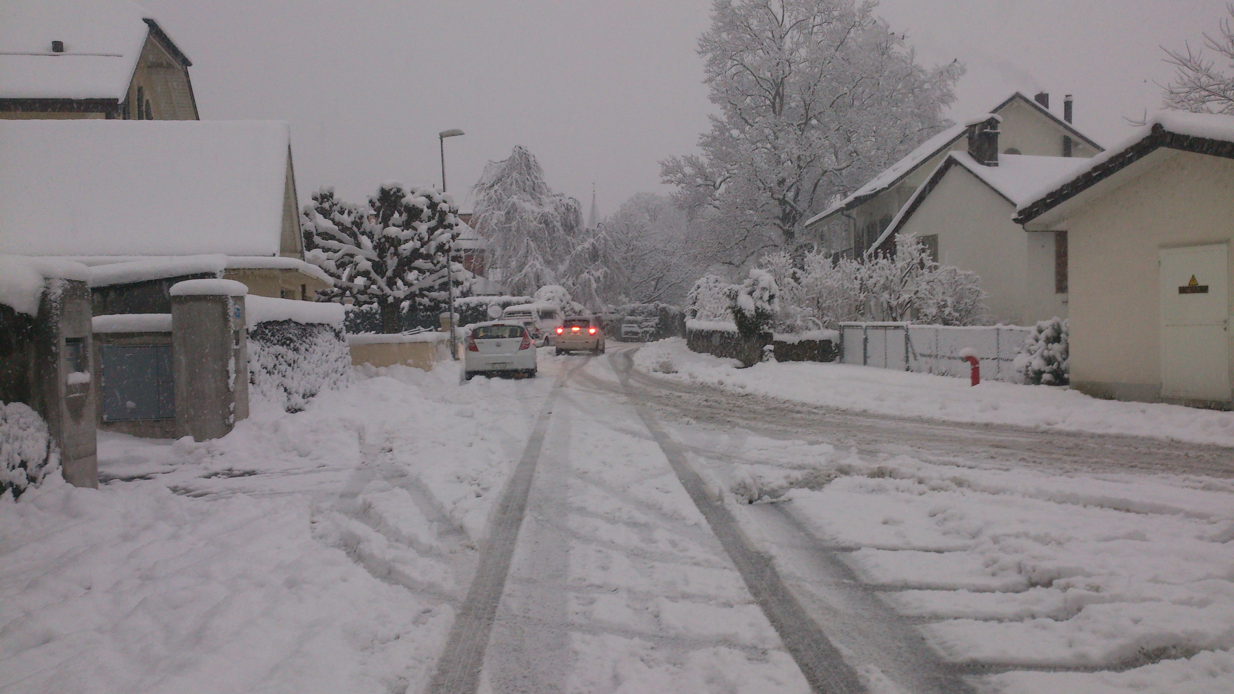 Ecublens